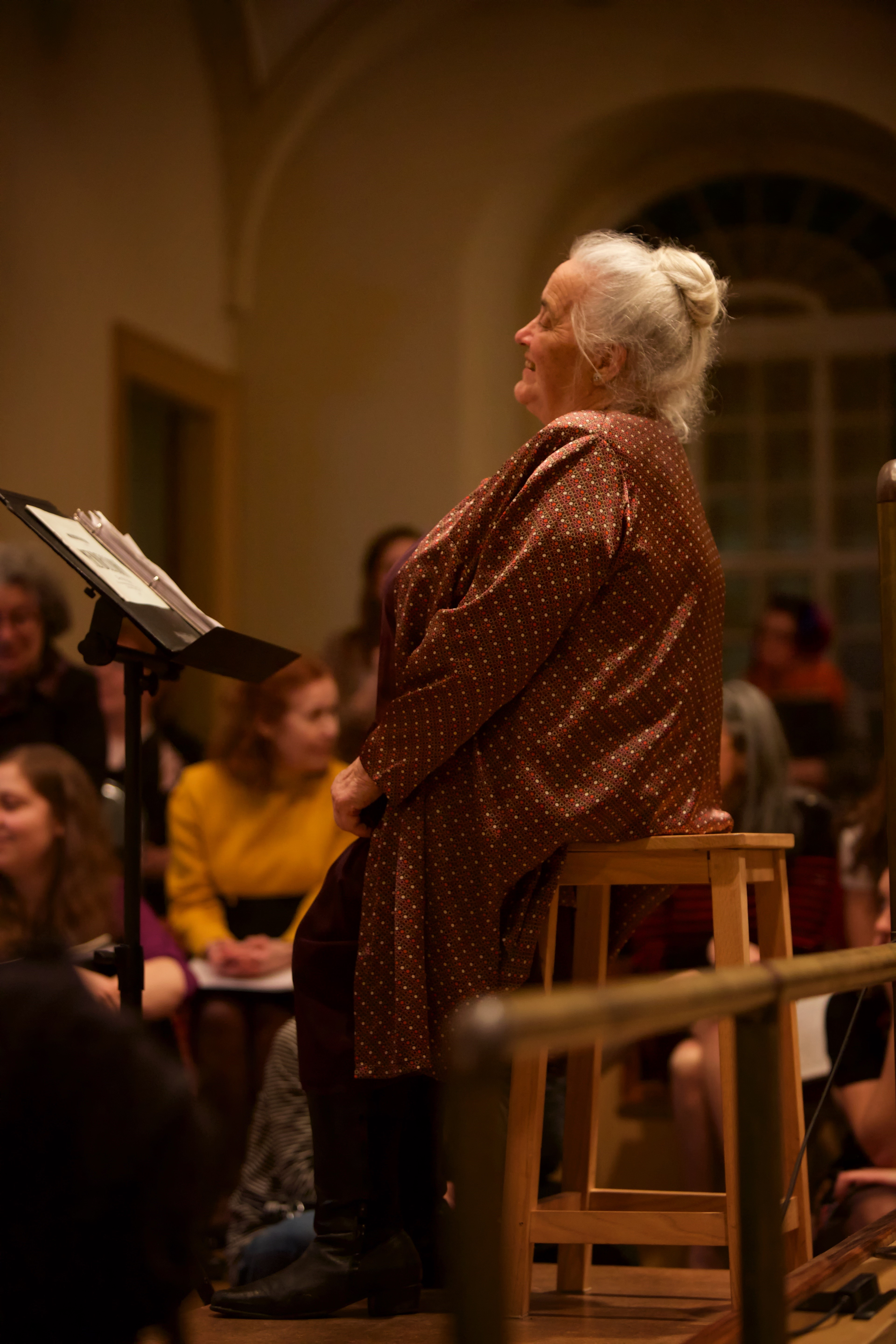 Élise Paré-Tousignant à l'oeuvre avec le choeur de Deschambault-Grondines.